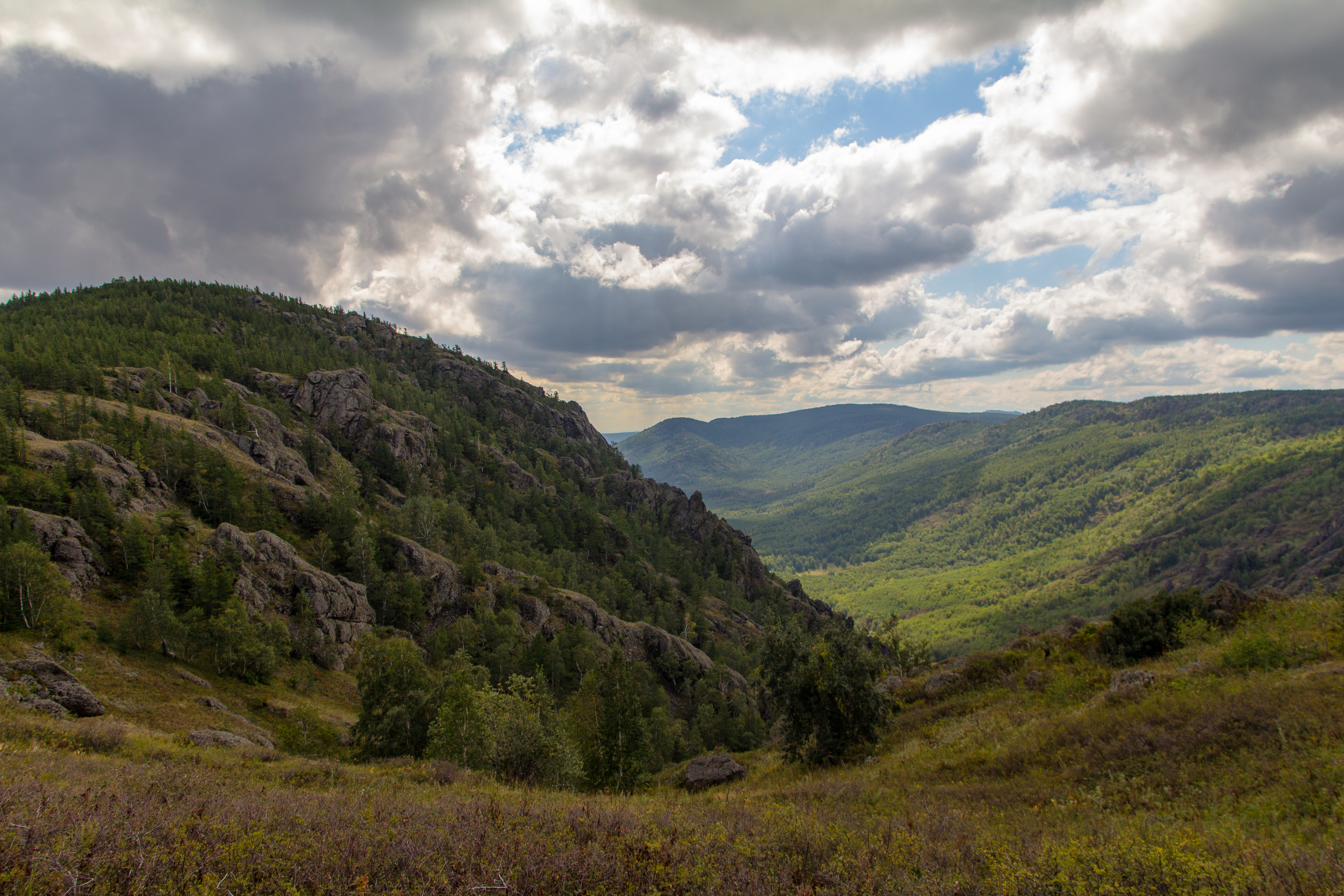 Участок хребта Крыктытау, Абзелиловский район This image is related to the protected area of Russia number 0210016